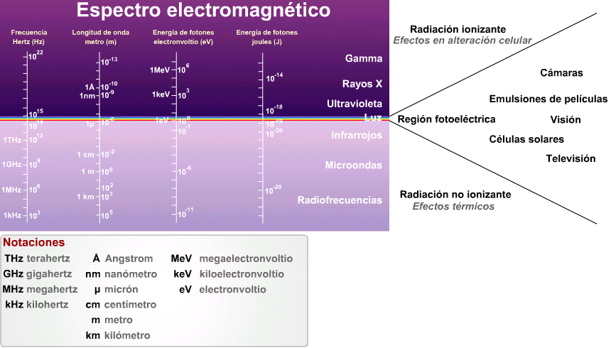 Descripción: Espectro electromagnético y mediciones de las radaiciones correspondientes. Autor: Luis María Benítez